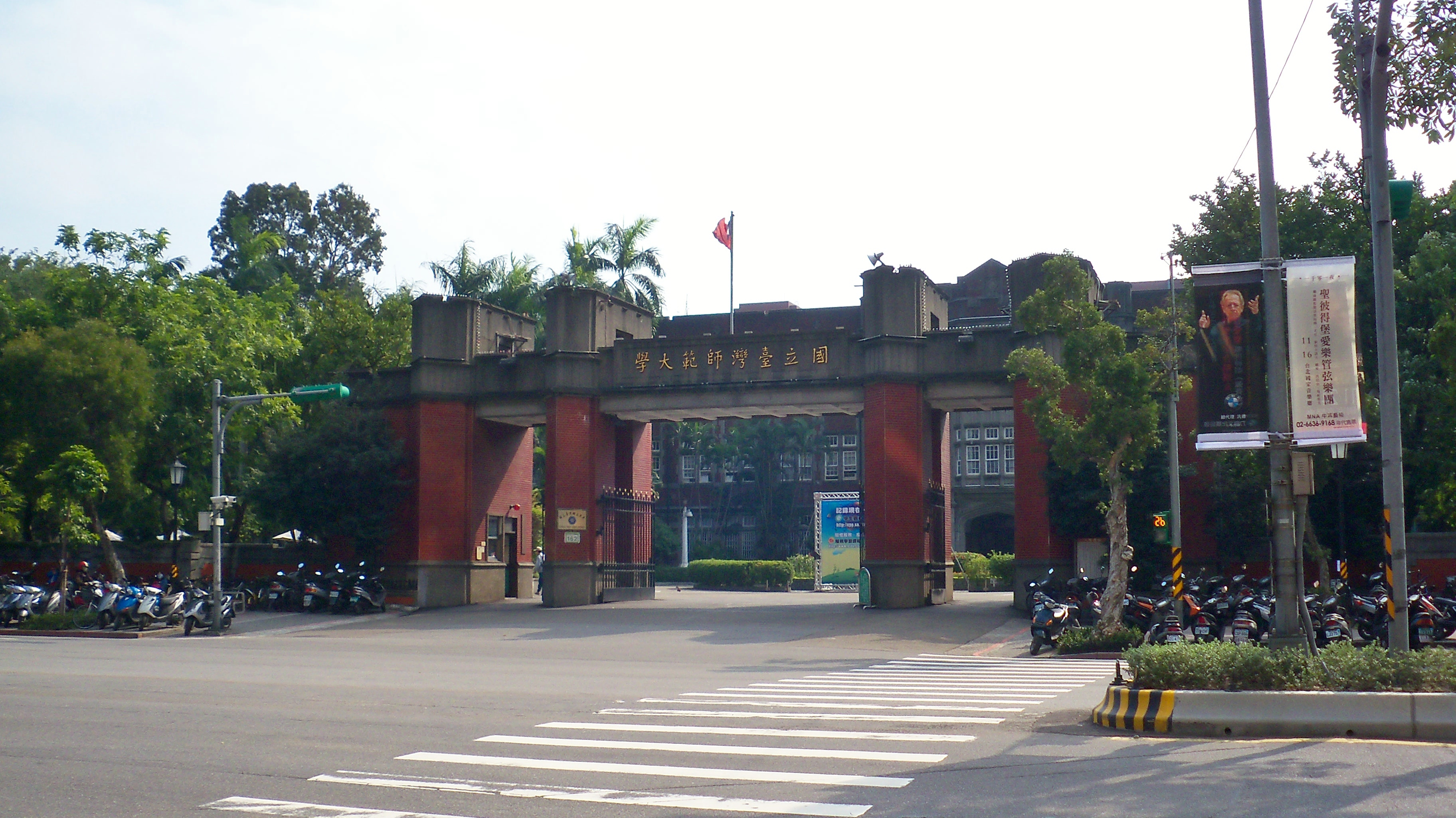 中文（台灣）: 臺灣師範大學臺北和平校區正門。